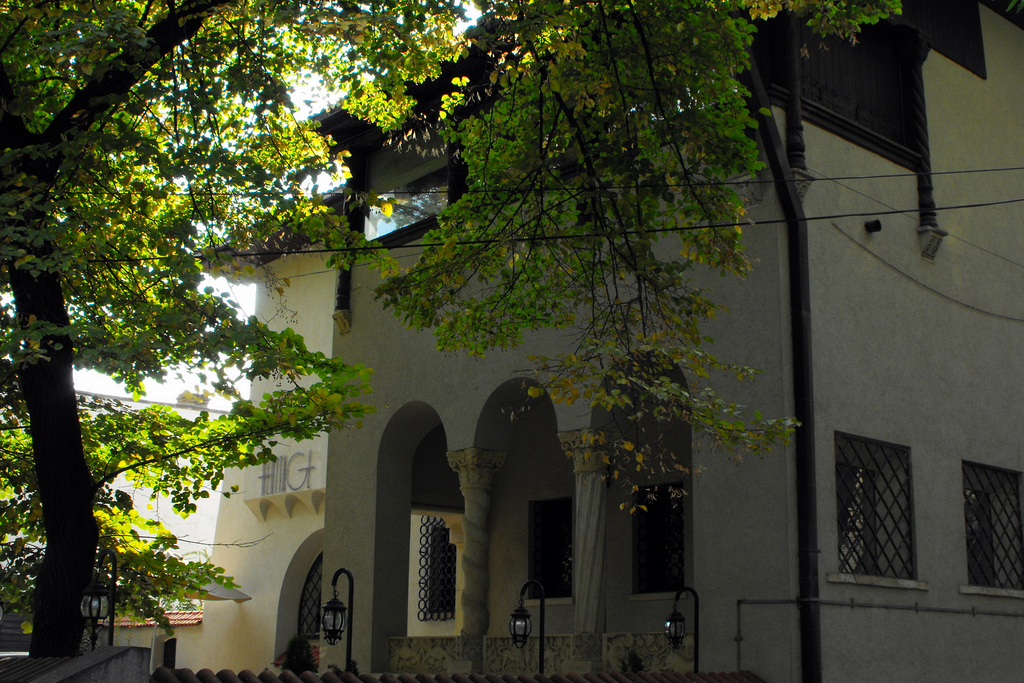 Polona 19